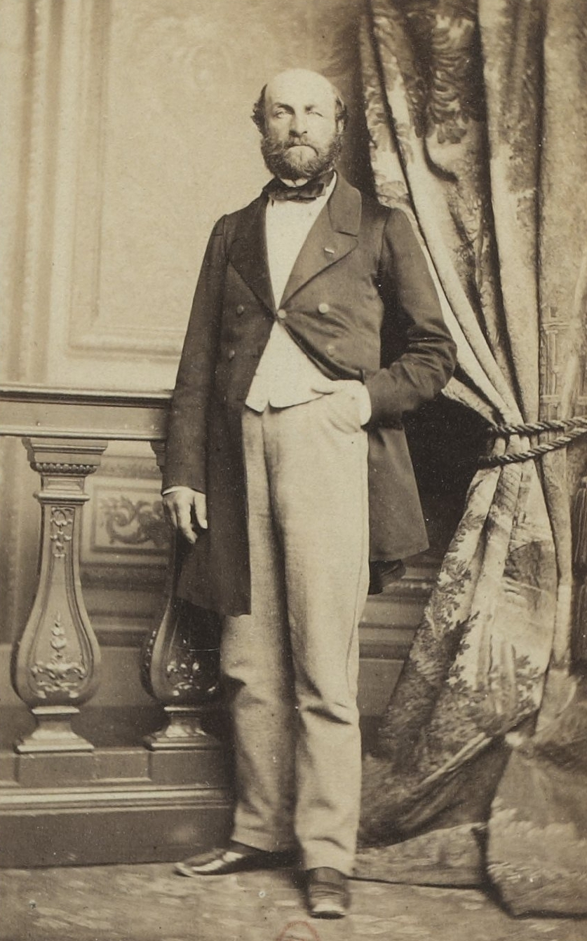 Album des députés au Corps législatif entre 1852-1857.